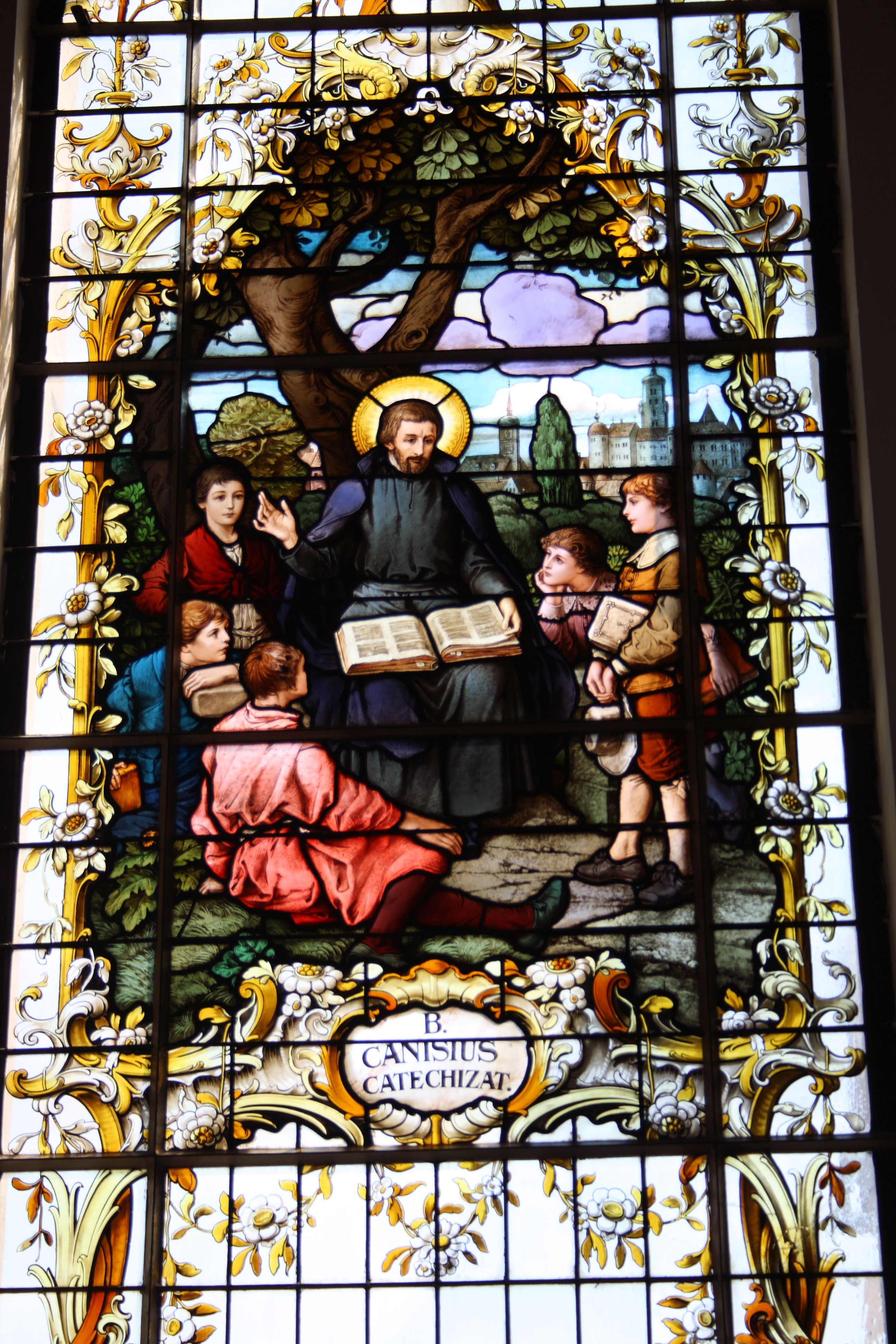 Katholische Kreuzauffindungskapelle, Hauskapelle der Akademie für Lehrerfortbildung und Personalführung in Bayern (ehemalige Kapelle des Priesterseminars) in Dillingen an der Donau (Bayern) von 1911, Glasfenster von Franz Xaver Zettler in München, Darstellung: Petrus Canisius; Inschrift: B.CANISIUS CATECHIZAT